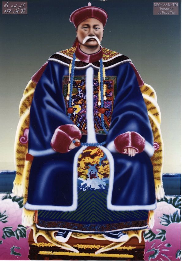 Le Seigneur du pays Taï, Deo Van Tri en grande tenue de Mandarin chinois